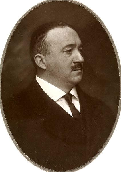 Depicted person: Halfdan Rode – Norwegian singer